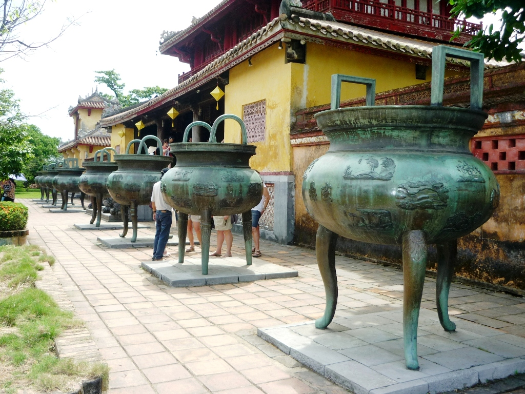 Thể loại:Huế Thể loại:Nhà Nguyễn Thể Loại:Di tích cố đô Huế